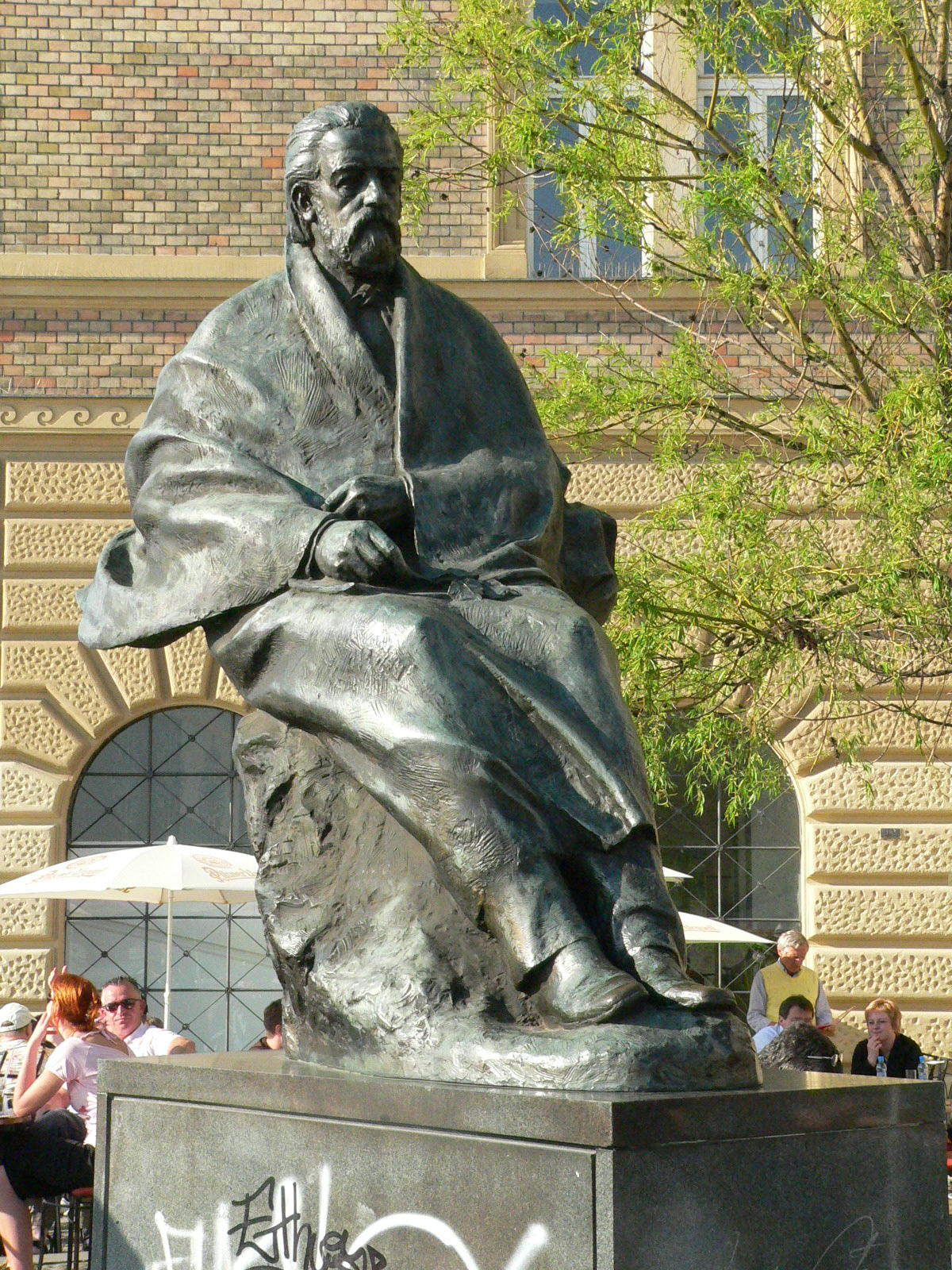 Smetana szobra, Prága